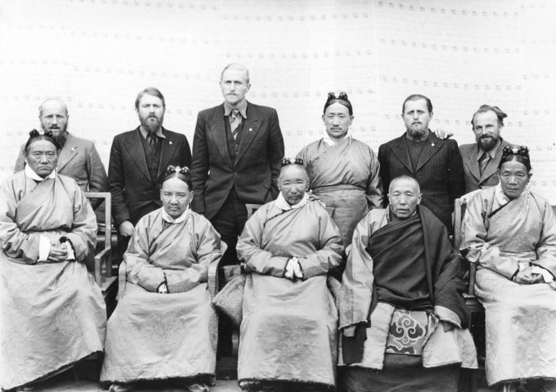 Tibetexpedition, Gruppenbild mit Ministern Lhasa, Expedition mit den tibetischen Ministern [Von links nach rechts: (stehend) Wienert, Schäfer, Beger, k. A., Geer, Krause; (sitzend) Tsarong Dzasa, Rest k. A.] Abgebildete Personen: Beger, Bruno Dr.: SS-Hauptsturmführer, Abteilungsleiter Sven-Hedin-Institut, Deutschland (GND 128720654) Schäfer, Ernst Dr.: SS-Sturmbannführer, Leiter des Sven-Hedin-Institutes, Deutschland (GND 123991420) Krause, Ernst: Mitarbeiter im Sven-Hedin-Institut, Deutschland Information added by Wikimedia users.